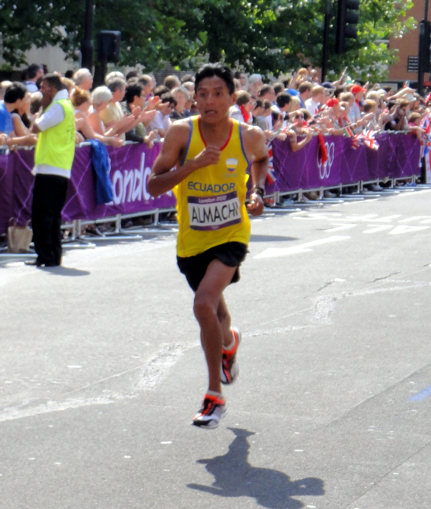 Miguel Angel Almachi (Ecuador) - London 2012 Men's Marathon